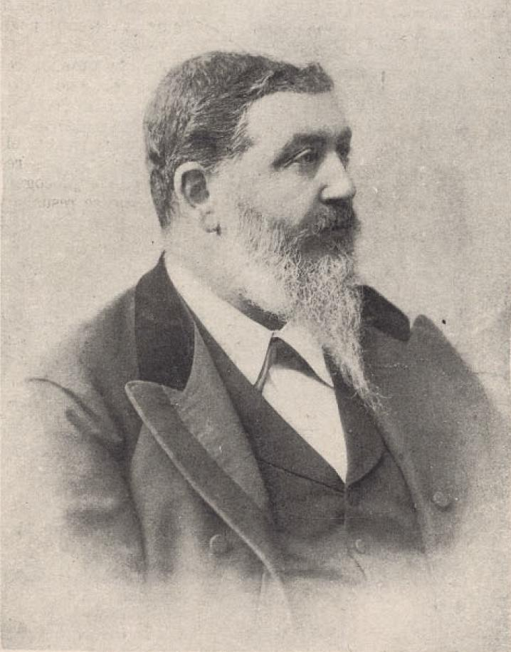 Guillermo Matta Goyenechea (Copiapó, 20 de septiembre de 1822 - † 27 de enero de 1899); poeta, ensayista y político chileno, representante del romanticismo en lo lírico y del liberalismo progresista laico en lo doctrinario. Fue uno de los fundadores del Partido Radical de Chile, junto a su hermano mayor Manuel Antonio Matta.